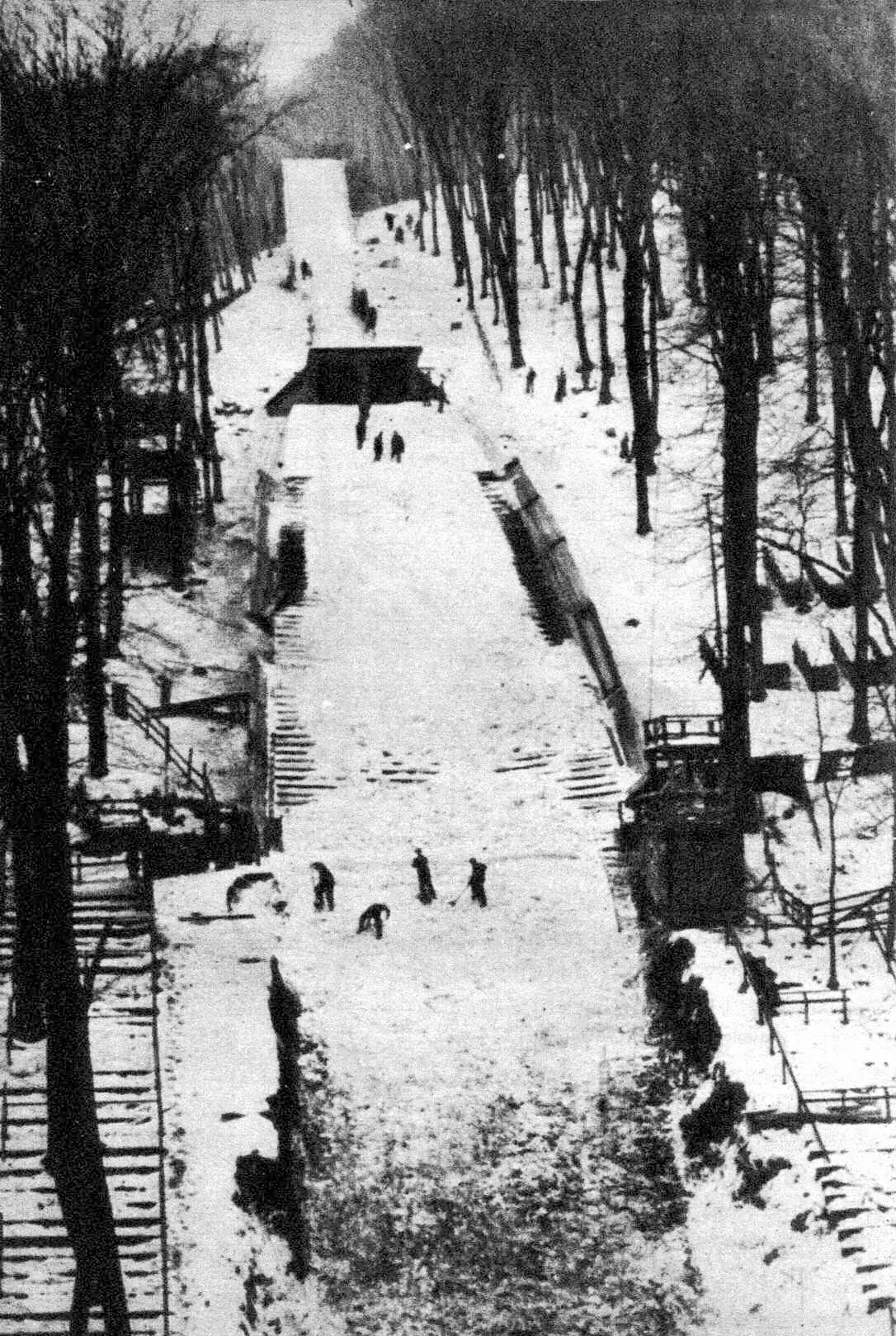 Wien, Döbling, Cobenzl-Schanze, 1933/34